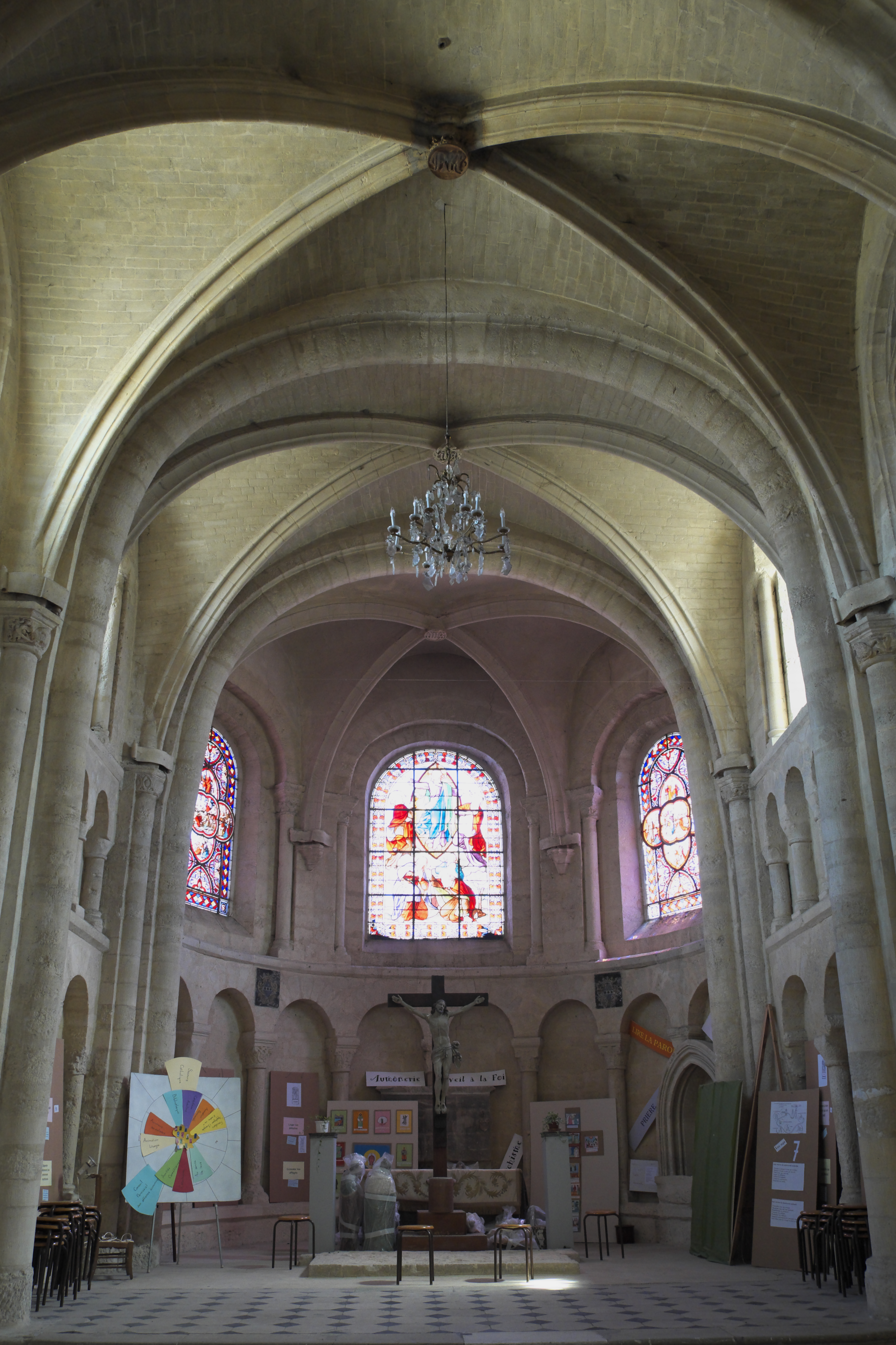 Katholische Kirche Saint-Nicolas in Maule im Département Yvelines (Île-de-France/Frankreich), Chor